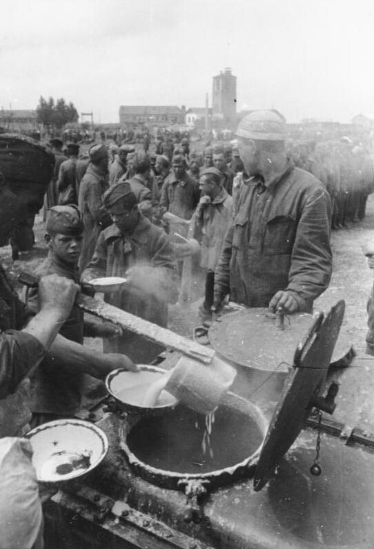 Prop.-Kp. 612 Archiv-Nr. 39/2270 Bildberichter: Hermann Text: Uetrecht Ort: Witebsk Datum 17.7.41 Im Gefangenenlager für 2000 Rotarmisten: Das Essen kochen sie sich selbst.